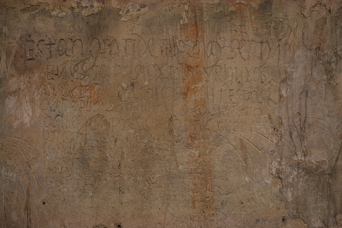 Soneto de principios del siglo XVII, situado en una de las paredes de una de las celdas del edificio. Se atribuye a Manuel de Castro, acusado de judaizante por el Tribunal de la Inquisición de Cuenca.